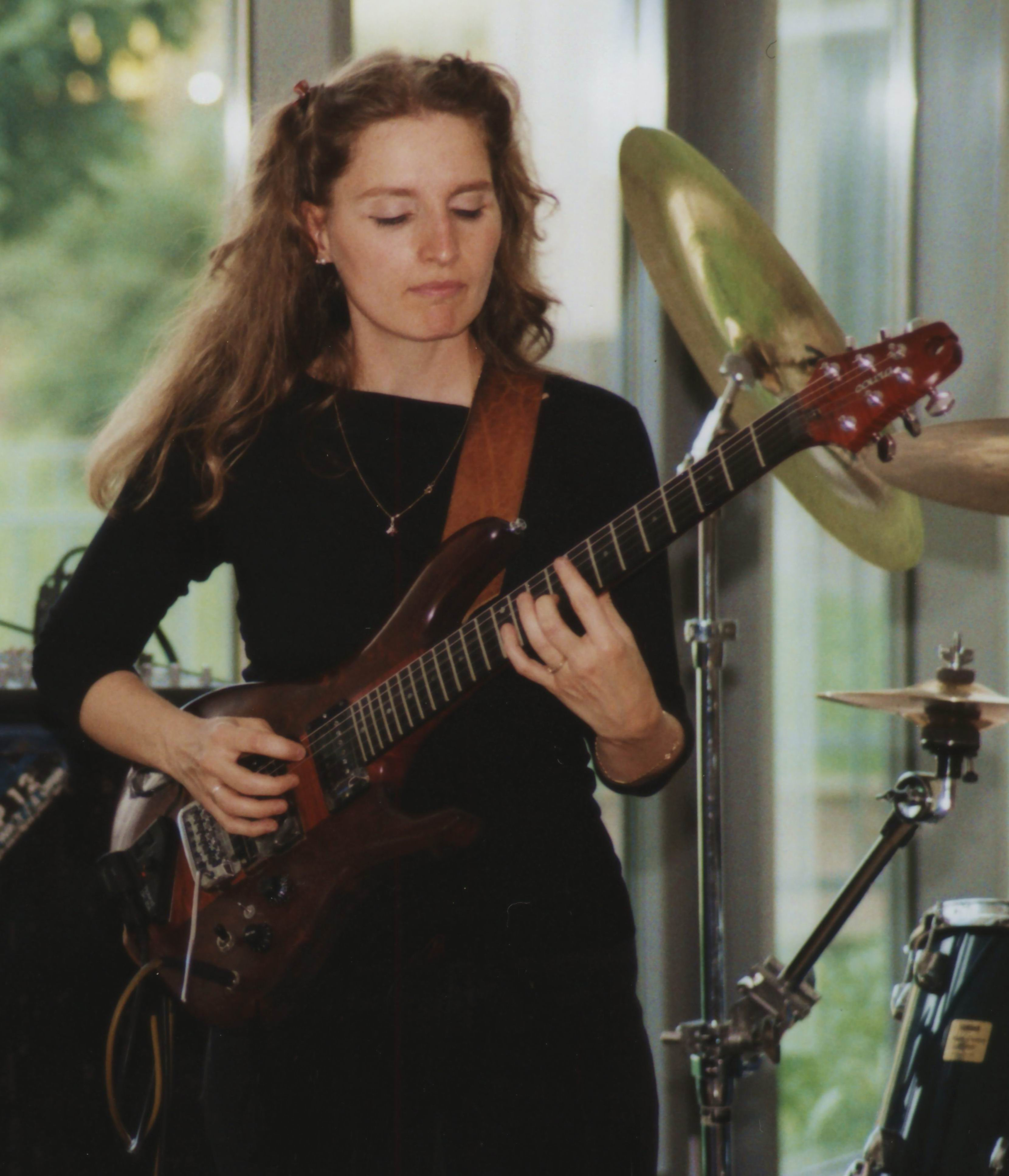 "Susan Weinert bei einem Konzertauftritt 2002 in Saarbrücken